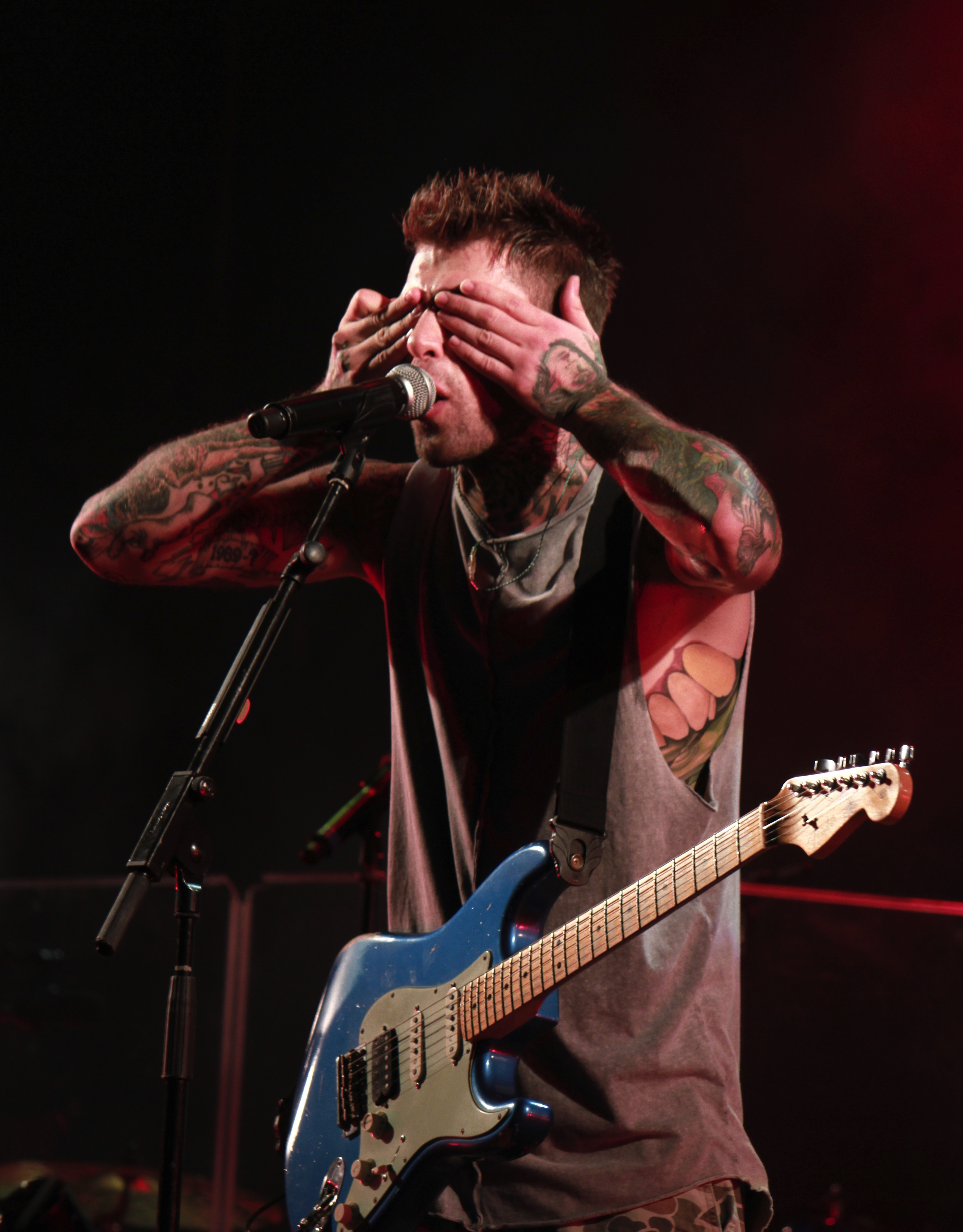 Fedez, Grugliasco (TO), 2015-07-18